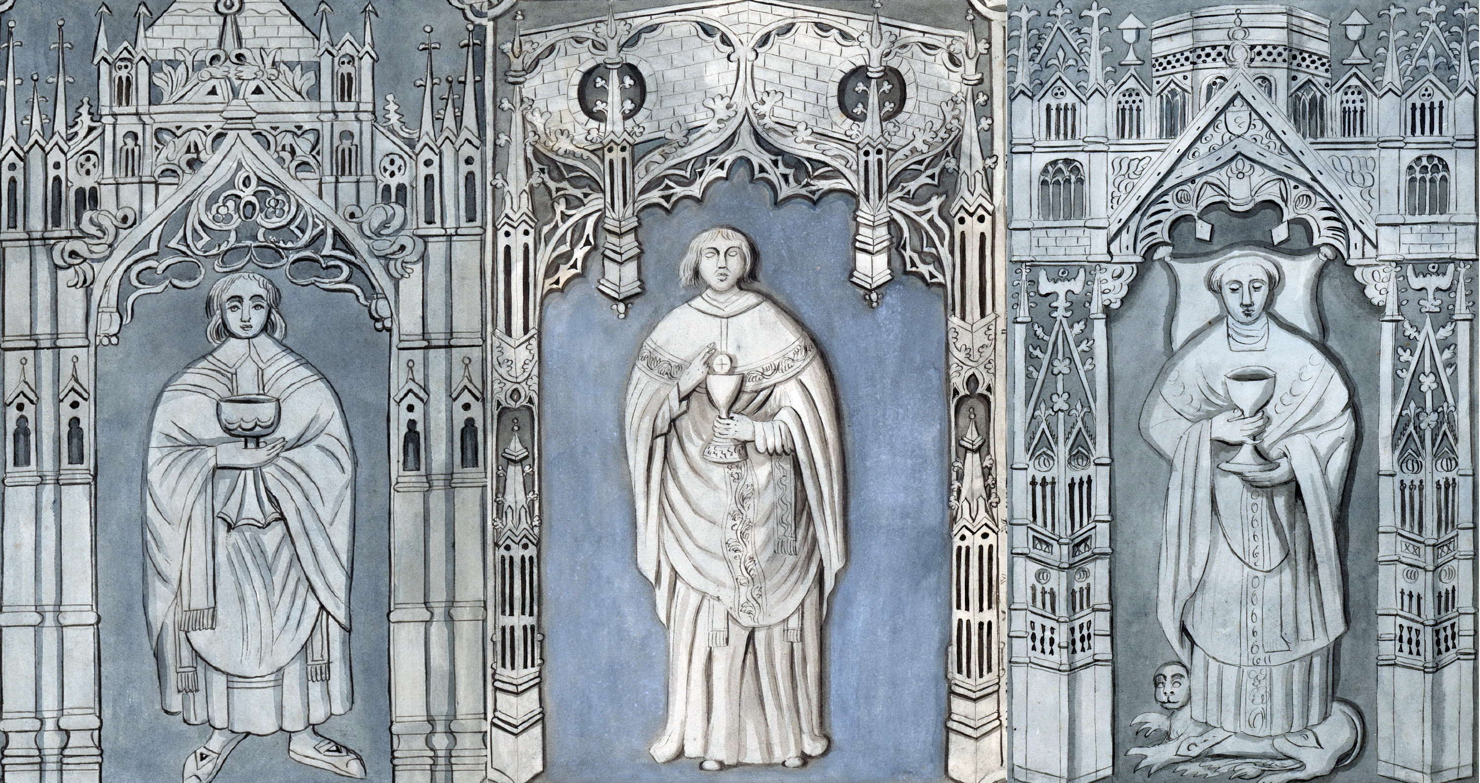 Collage van drie tekeningen van Philippe van Gulpen (1792–1862) van grafzerken van kanunniken in de Onze-Lieve-Vrouwekerk in Maastricht. De collage van kleon3 maakt gebruik van drie bestanden met een vrije licentie op Wikimedia Commons: File:Maastricht,_OLV-kerk,_grafsteen_v_kanunnik_(Ph_v_Gulpen,_ca_1840).jpg File:Maastricht, OLV-kerk, grafsteen v kanunnik2 (Ph v Gulpen, ca 1840).jpg File:Maastricht,_OLV-kerk,_grafsteen_kanunnik_(Ph_v_Gulpen,_ca_1840).jpg